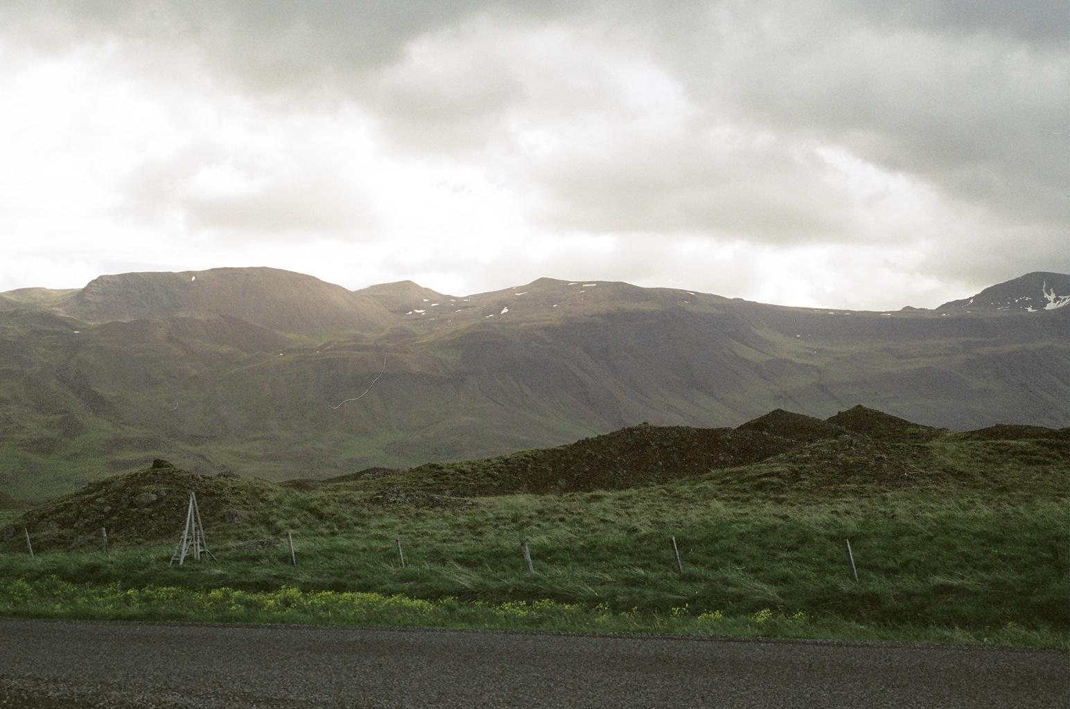 Das Bild zeigt die Hügel des Vatnsdalur im Norden von Island, vom 1er aus aufgenommen.